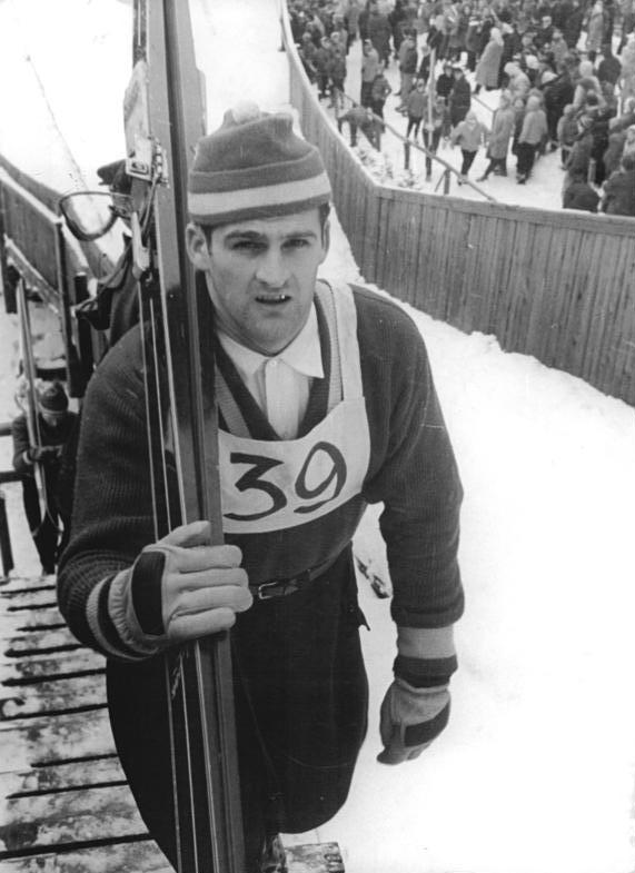 Zentralbild Wendorf 22.1.1959 DDR-Spezialsprungläufer UBz: H. Recknagel (SC Motor Zella-Mehlis).